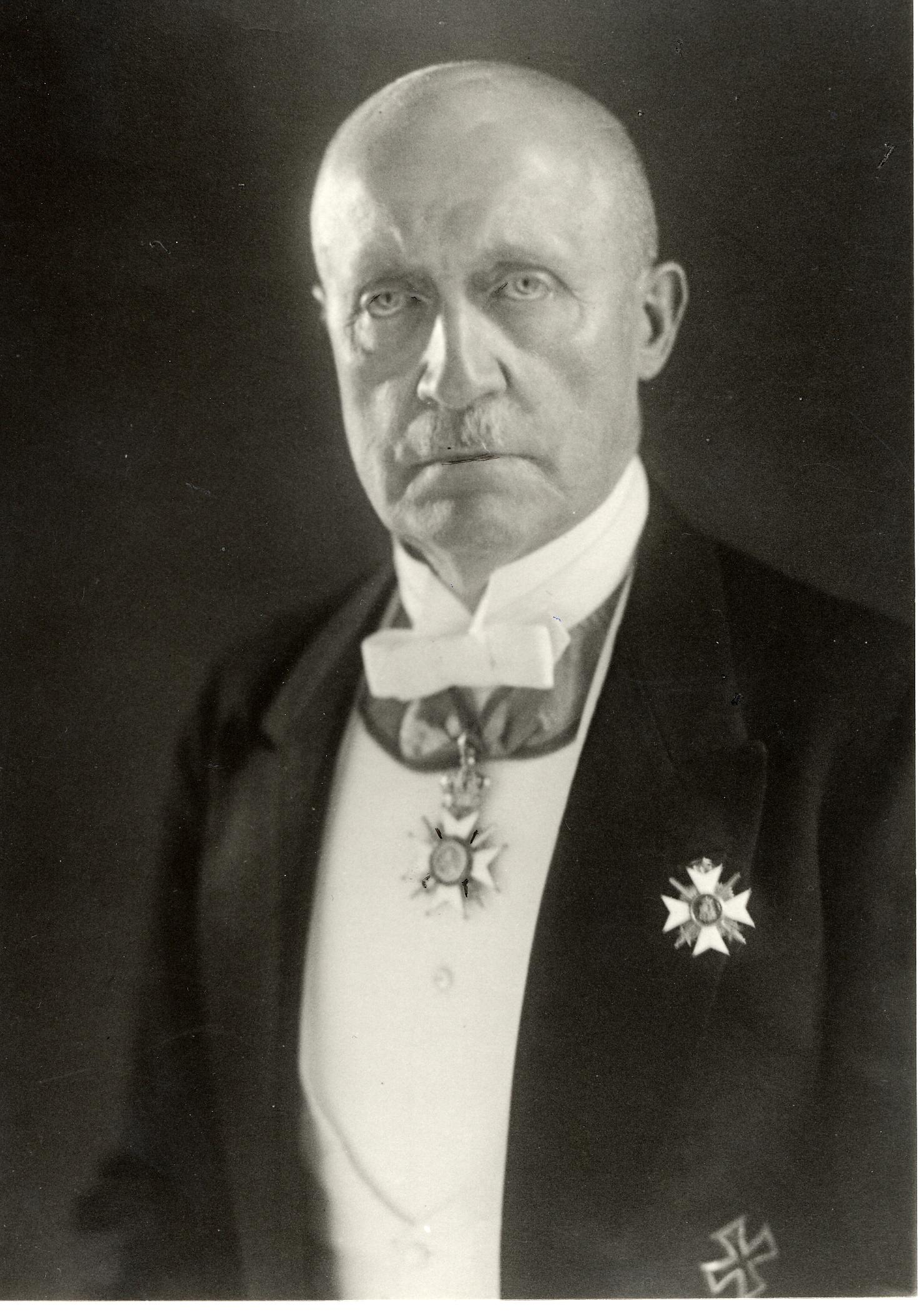 Porträtfotografie von Karl Schulze-Pelkum (1860-1939)